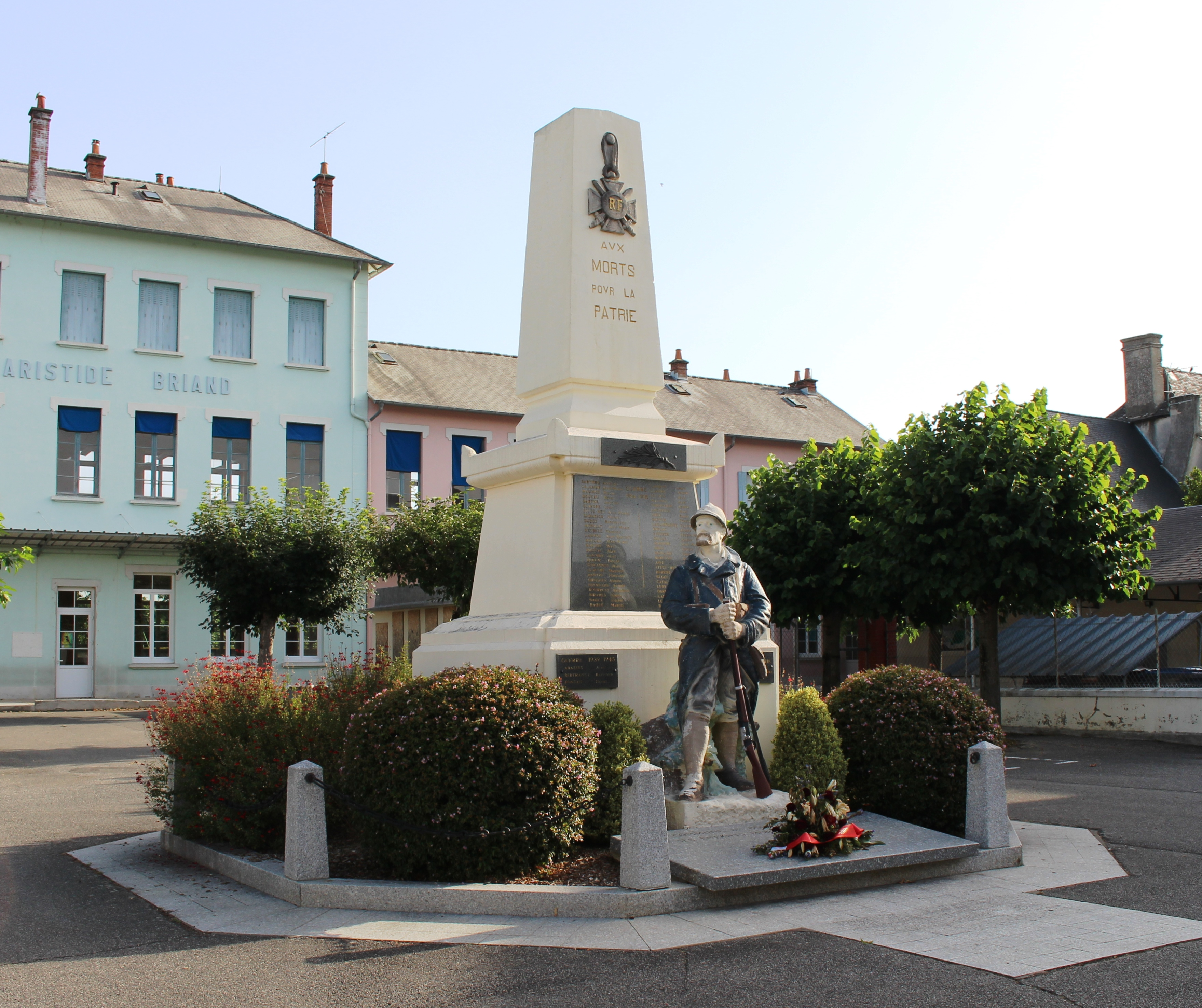 Monument aux morts de Bordères-sur-l'Échez (Hautes-Pyrénées)